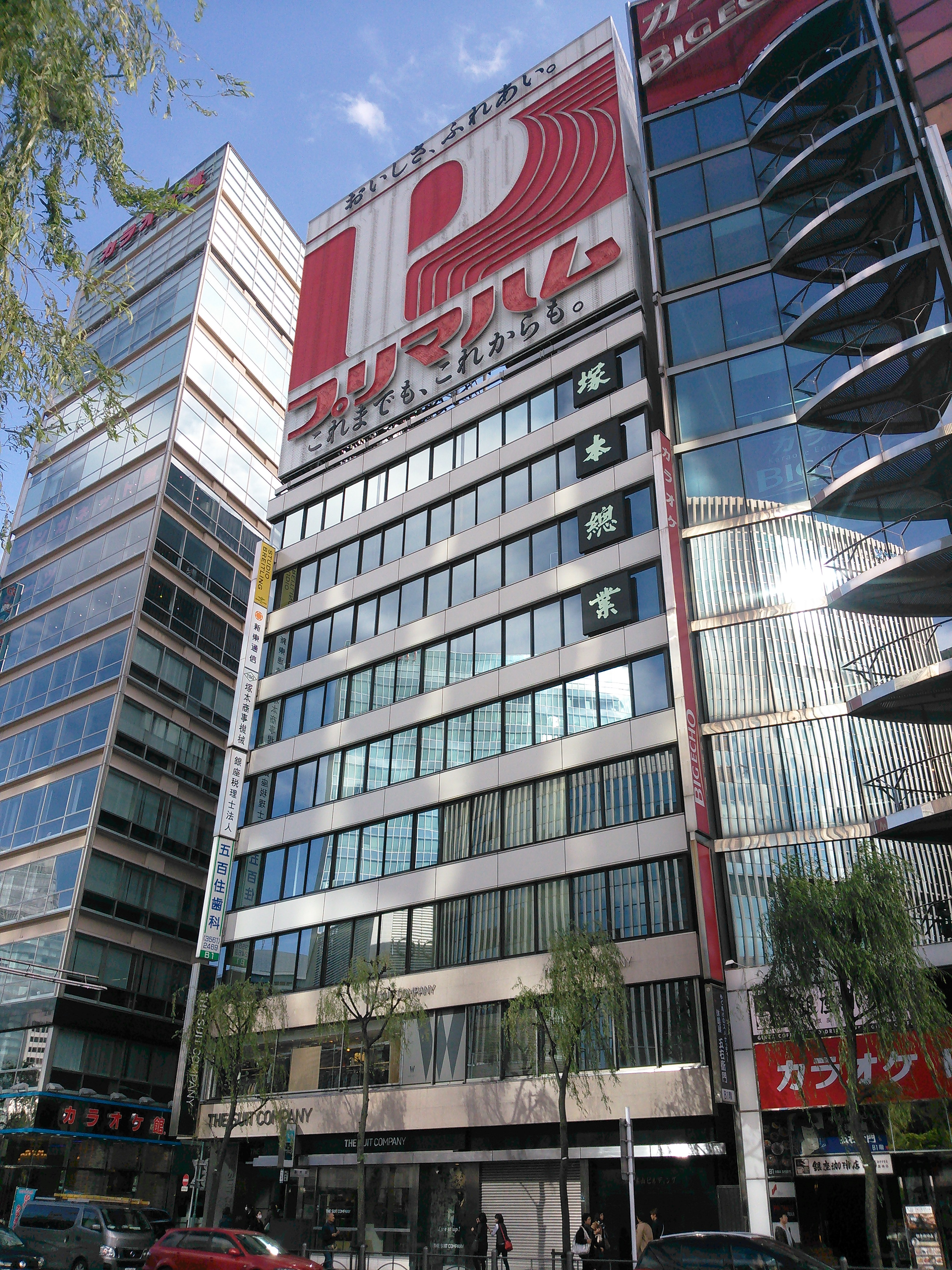 東京都中央区銀座、塚本素山ビル